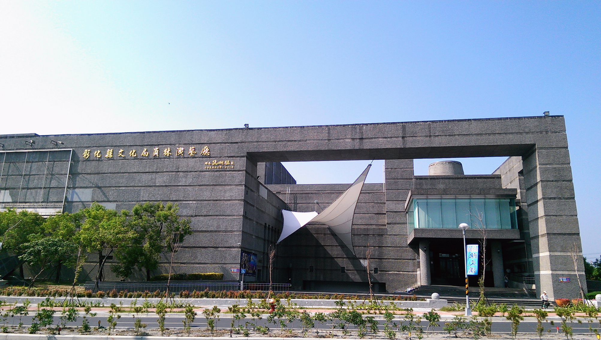 中文（台灣）: 彰化縣文化局員林演藝廳